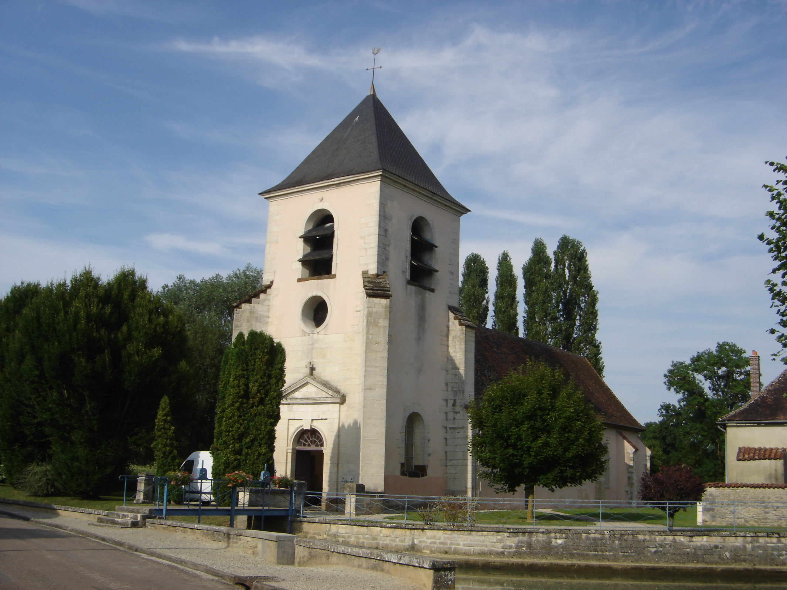 Eglise Saint Martin d'Hivers - Amance - Aube - France